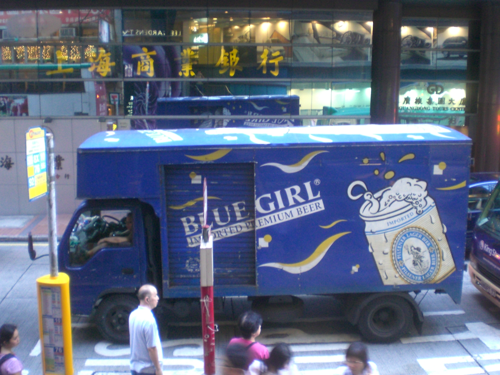 香港銅鑼灣邊寧頓街，近捷成洋行及上海商業銀行